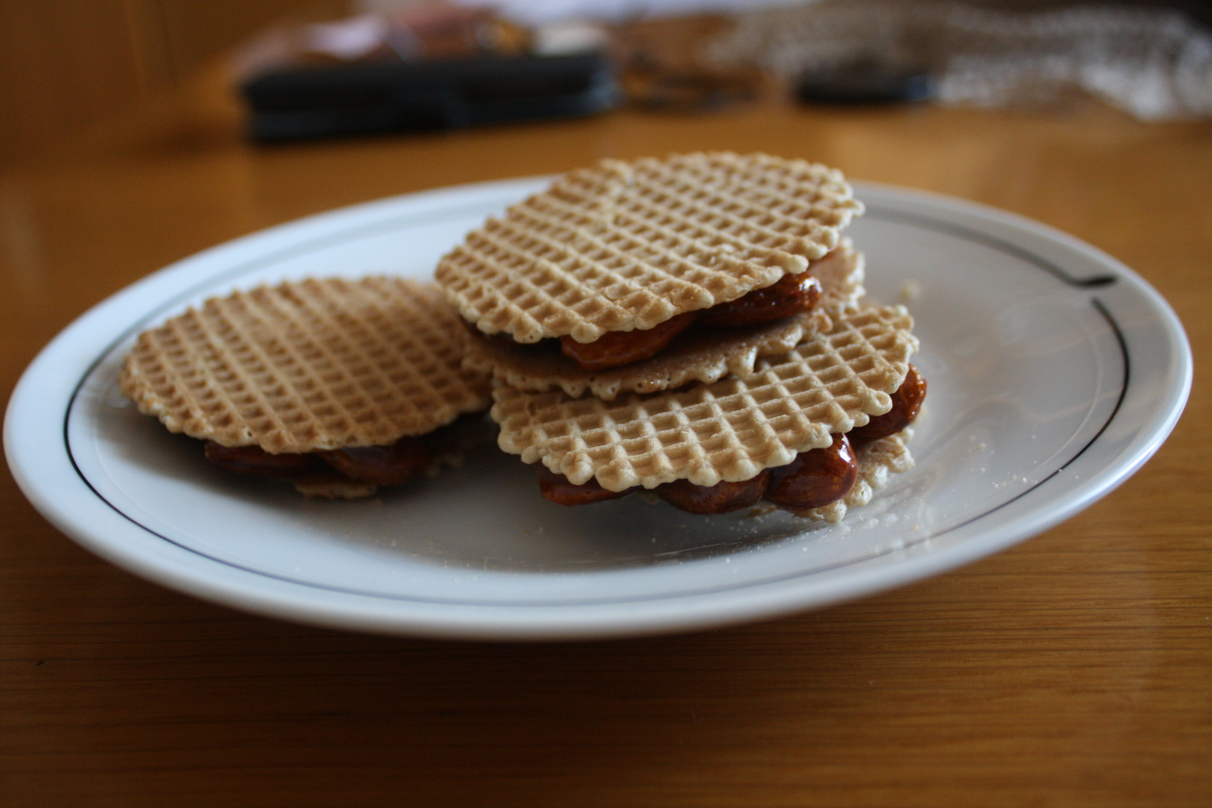 Un piatto di cupeti (coppette), dolce tipico di Busto Arsizio composto da mandorle tostate e zuccherate tra due cialde, consumate, secondo la tradizione, l'8 dicembre, festa dell'Immacolata Concezione. Tradizione vuole che i promessi sposi delle ragazze bustocche portino questi dolci all'amata proprio nel giorno dell'Immacolata per chiedere loro la mano.